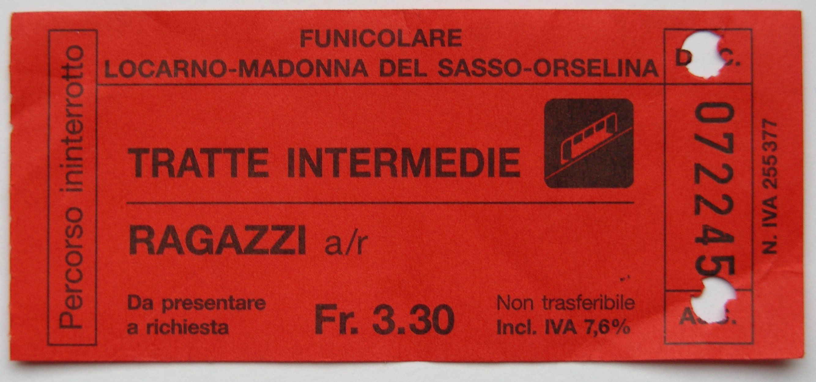 Ermässigtes Billet für das Funicolare Locarno–Madonna del Sasso (von einer Zwischenstation bis zur MS) (Juli 2007)